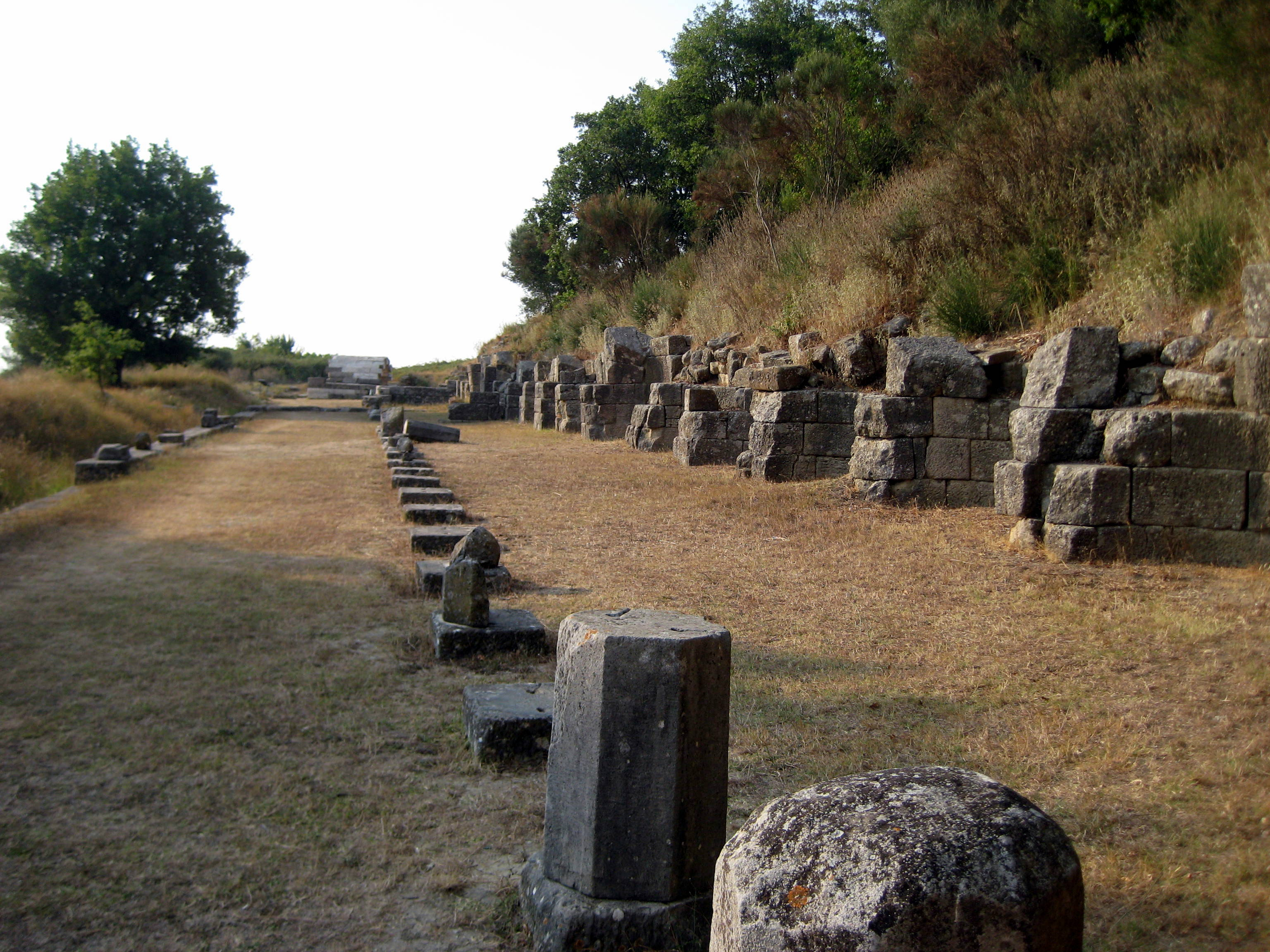 Apollonia (Albania)